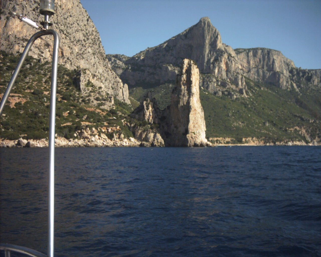 pedra longa sardinia italy